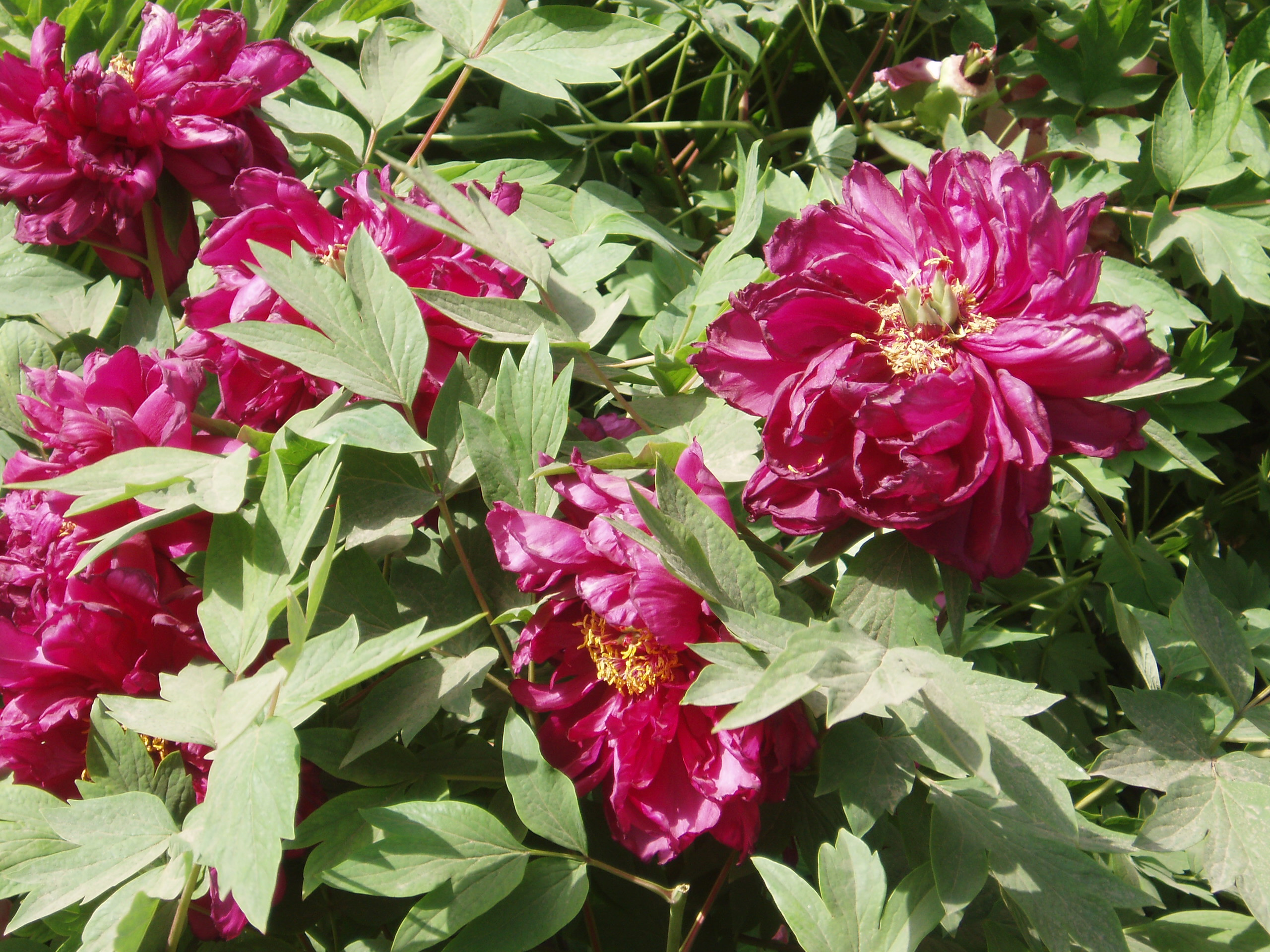 Peony